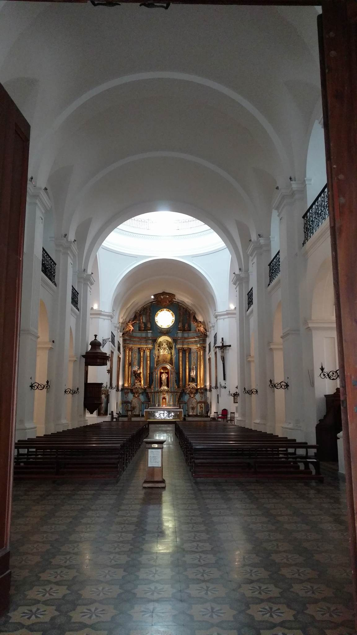 El interior de la Iglesia de San Ignacio en San Telmo